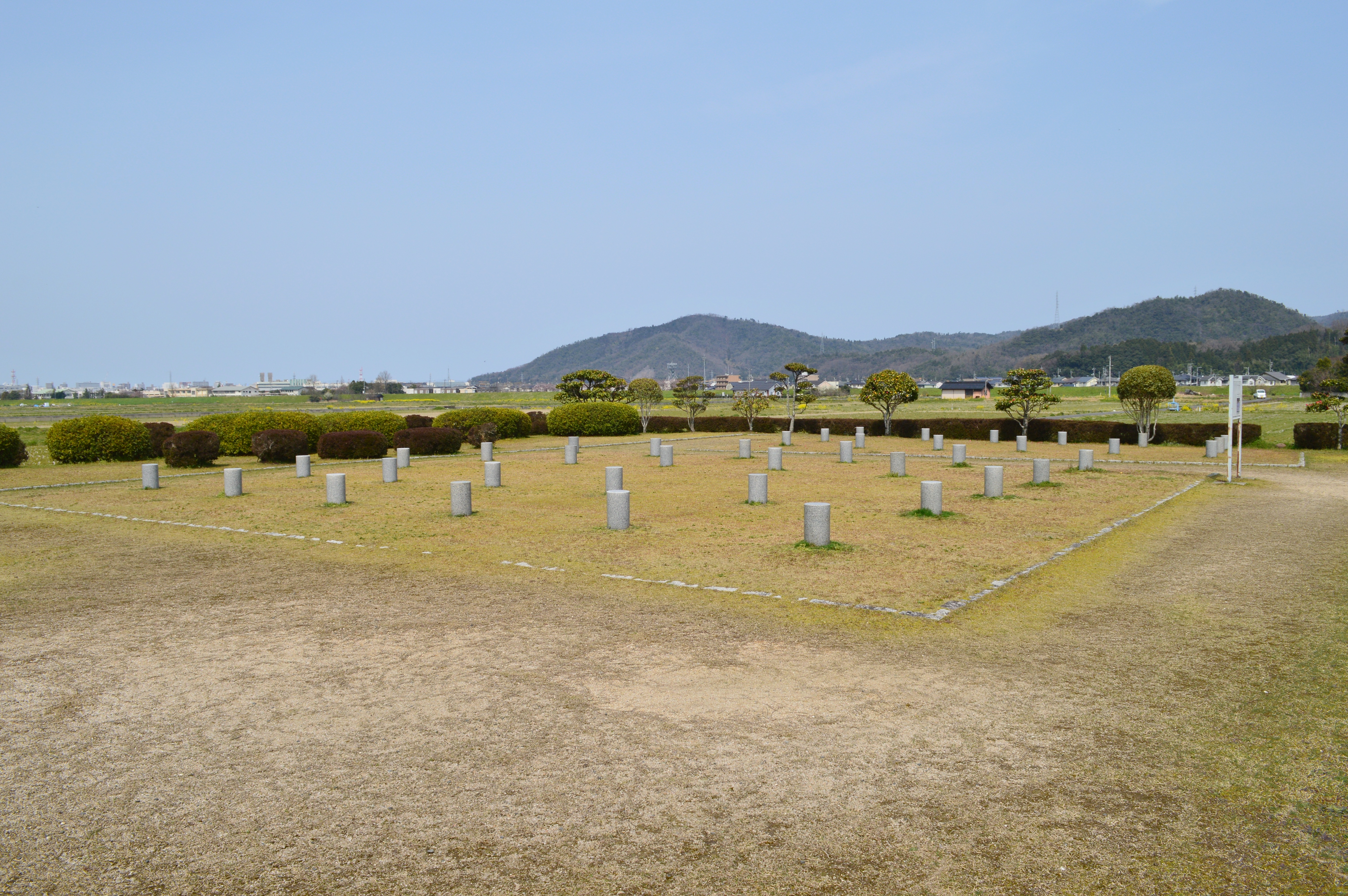 因幡国庁跡 正殿・後殿 Nikon D3200